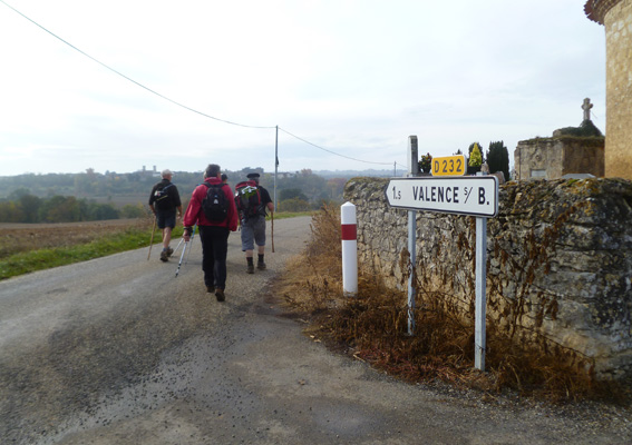 Plus que quelques centaine de mètres à parcourir. La bourgade fortifiée se profile à l'horizon.